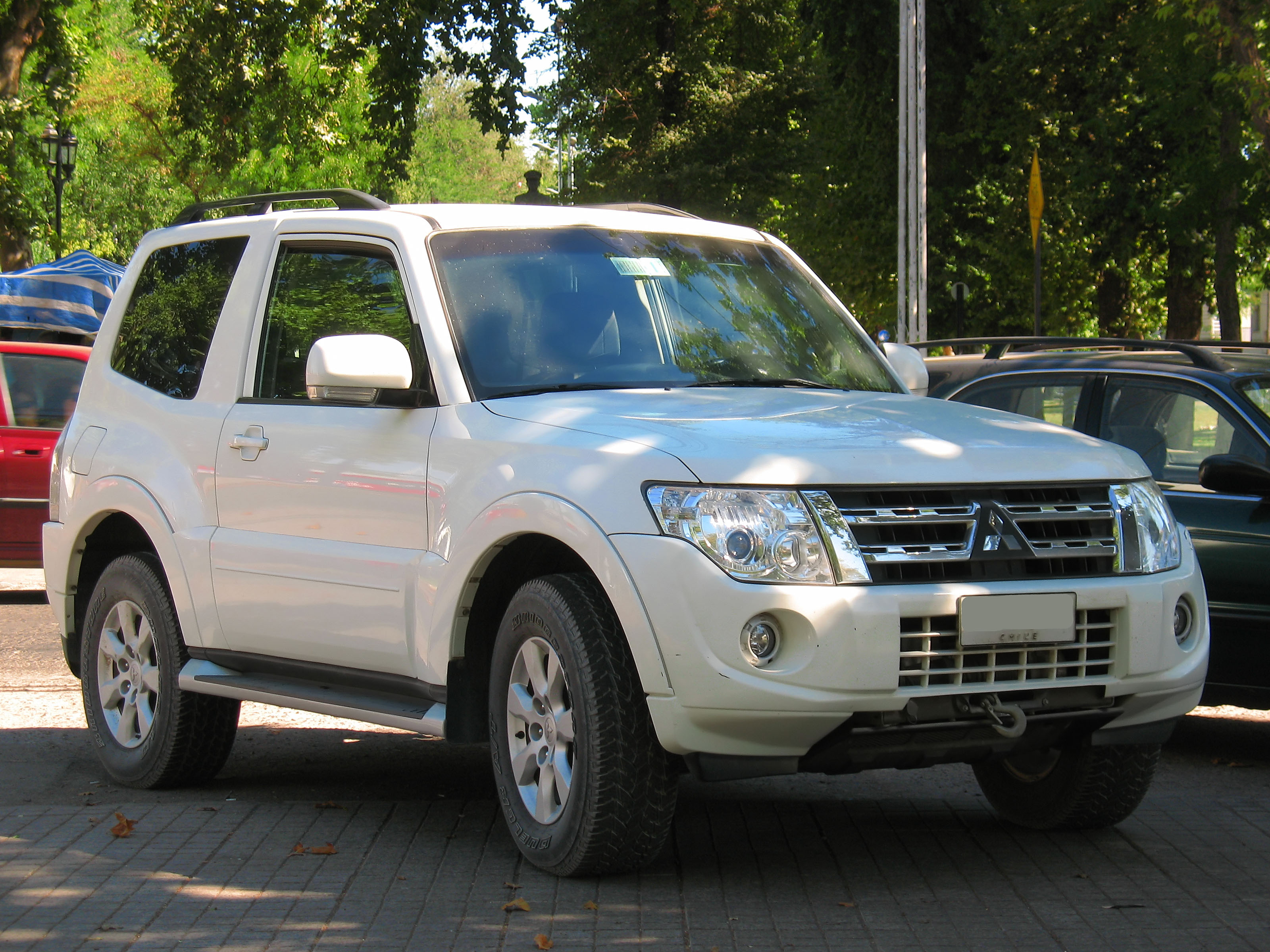 Mitsubishi Montero GLS 3.2 Di-D 2011